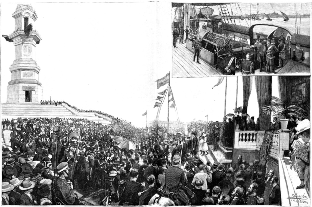 El crucero Conde de Venadito e inaguración de la reina regente María Cristina del Monumento del IV Centenario del Descubrimiento de América.